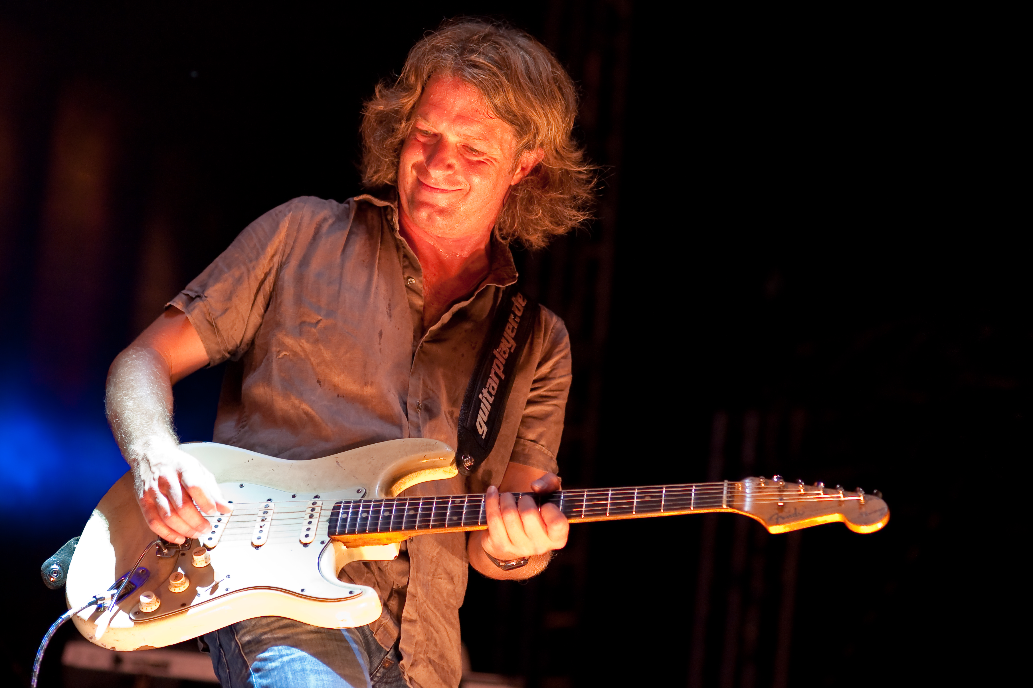 Thomas Blug bei einem Auftritt am Saarbrücker Stadtfest 2009 vor dem Staatstheater.